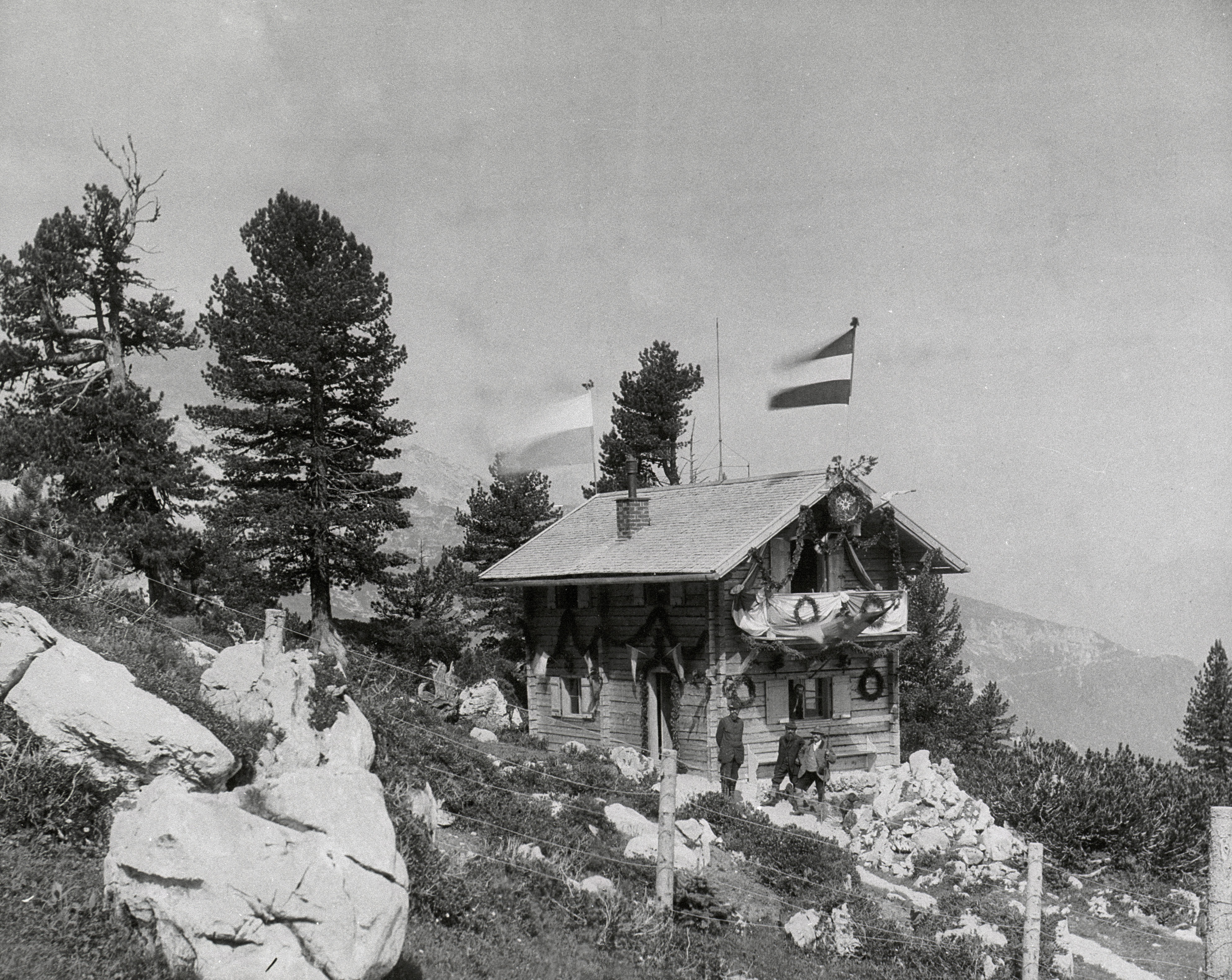 historisches Foto vom Gärtnerhaus im Alpengarten auf dem Schachen